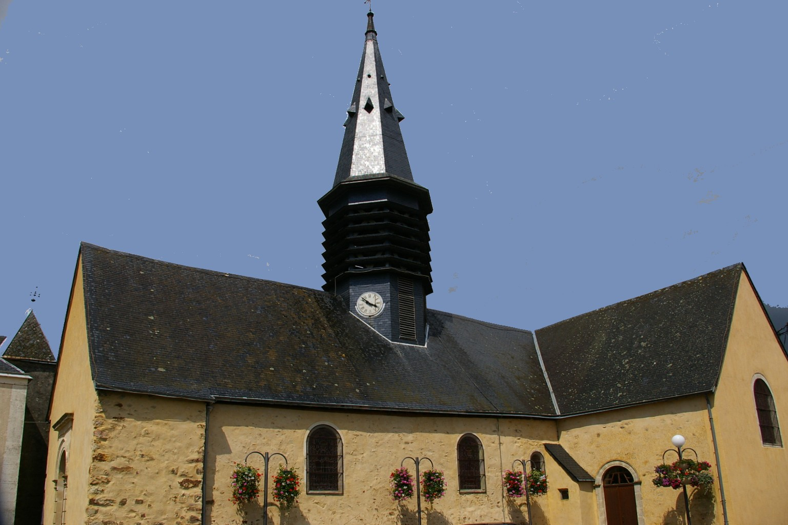 Eglise Saint-Pierre et Saint-Paul de Torcé-Viviers-en-Charnie (53)